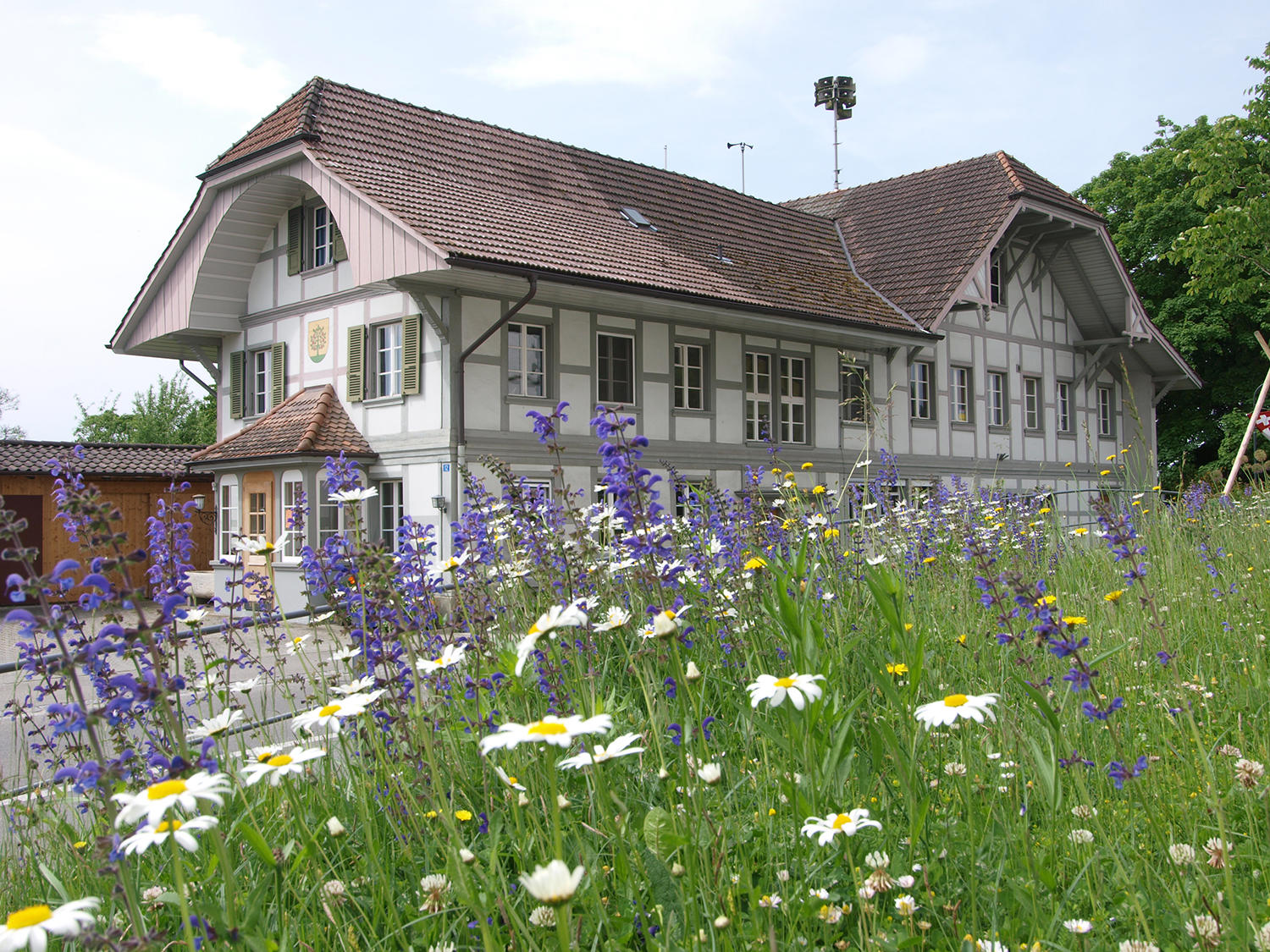 Bürogebäude um 2008